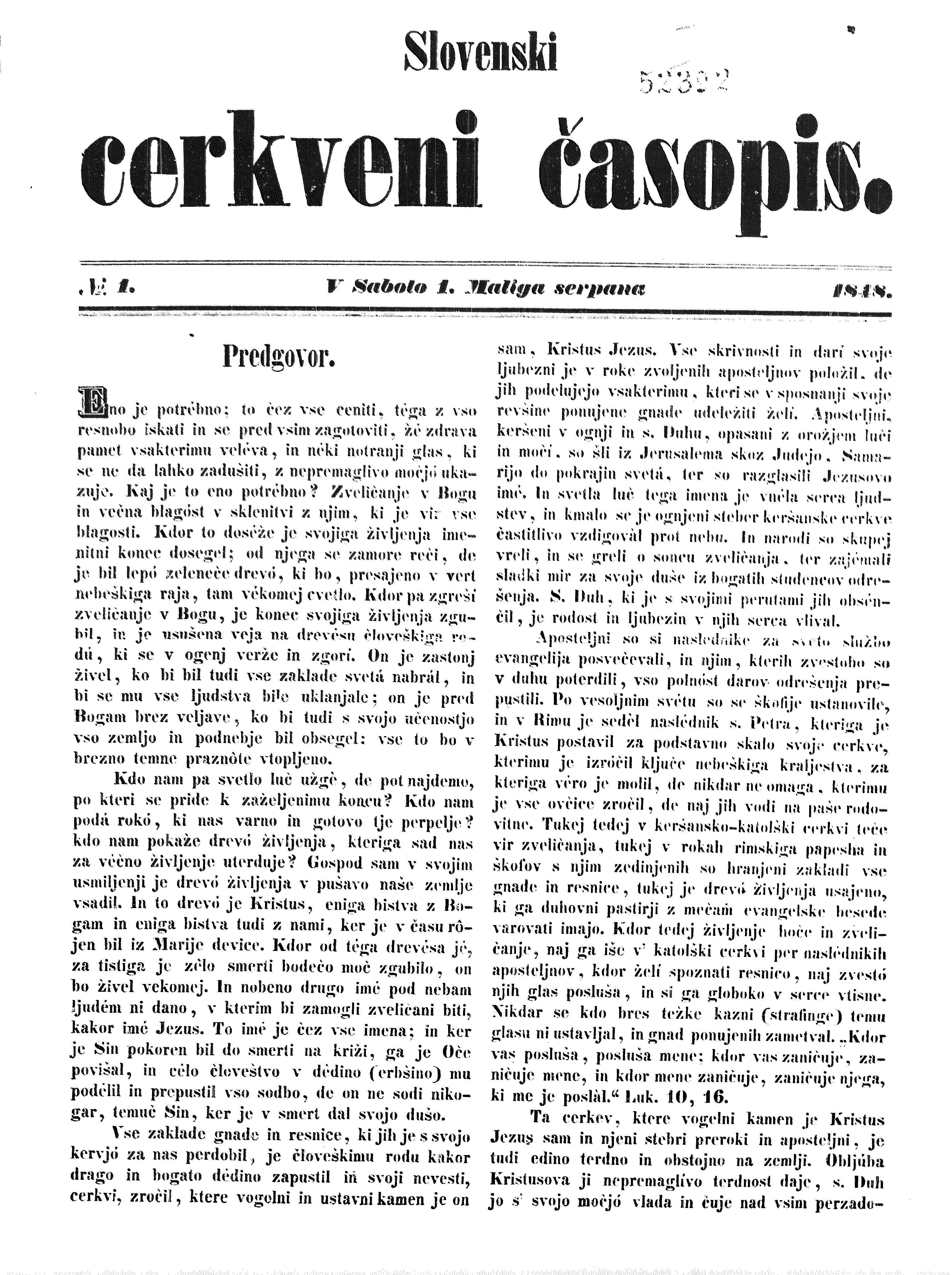 Naslovnica časopisa z naslovom Slovenski cerkveni časopis iz leta 1848. Časopis je bil predhodnik časopisa Zgodnja danica, ki je med leti 1849 in 1902 izhajal v Ljubljani